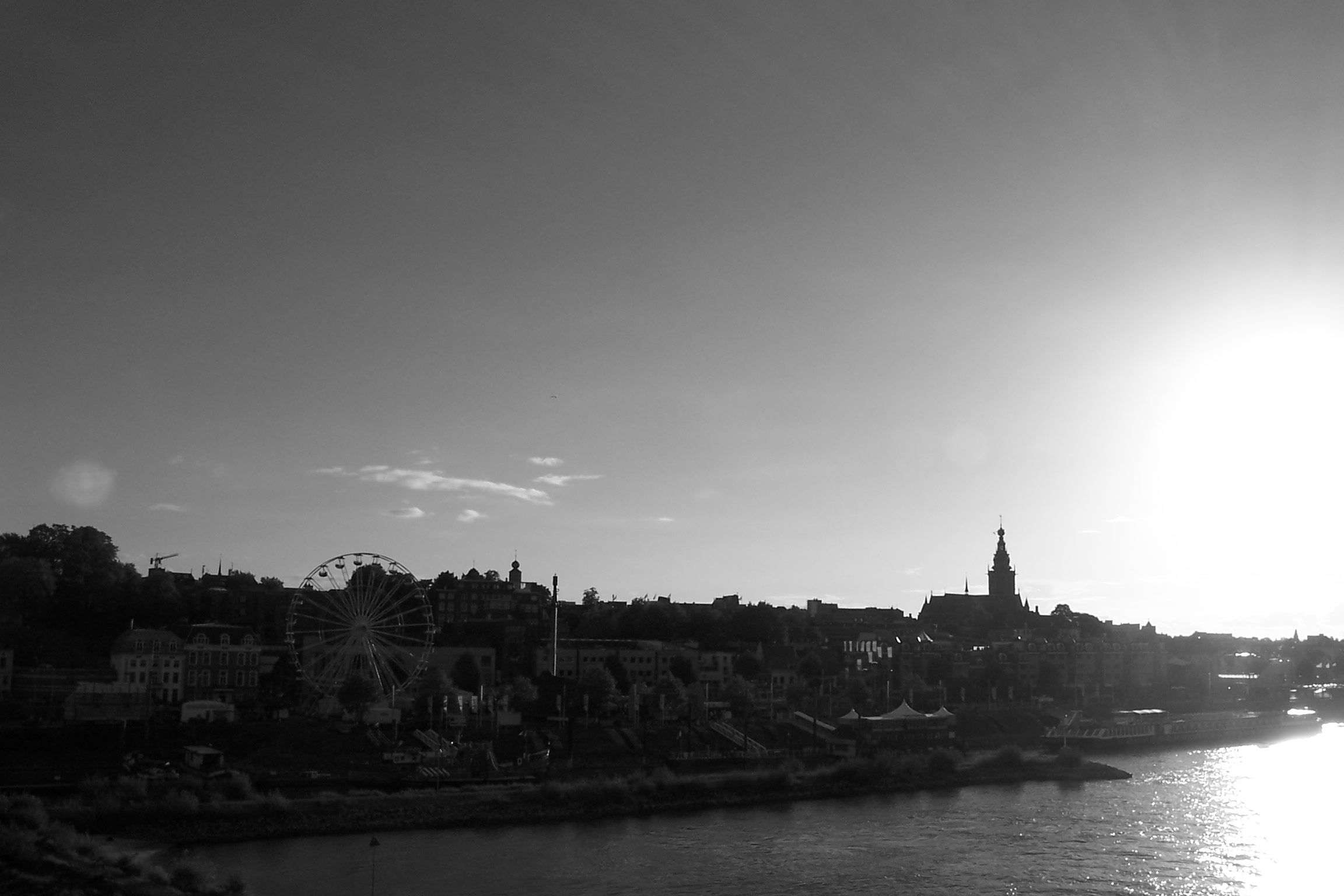 De horizon van Nijmegen, met de Stevenskerk in het midden, gezien vanaf de Waalbrug.